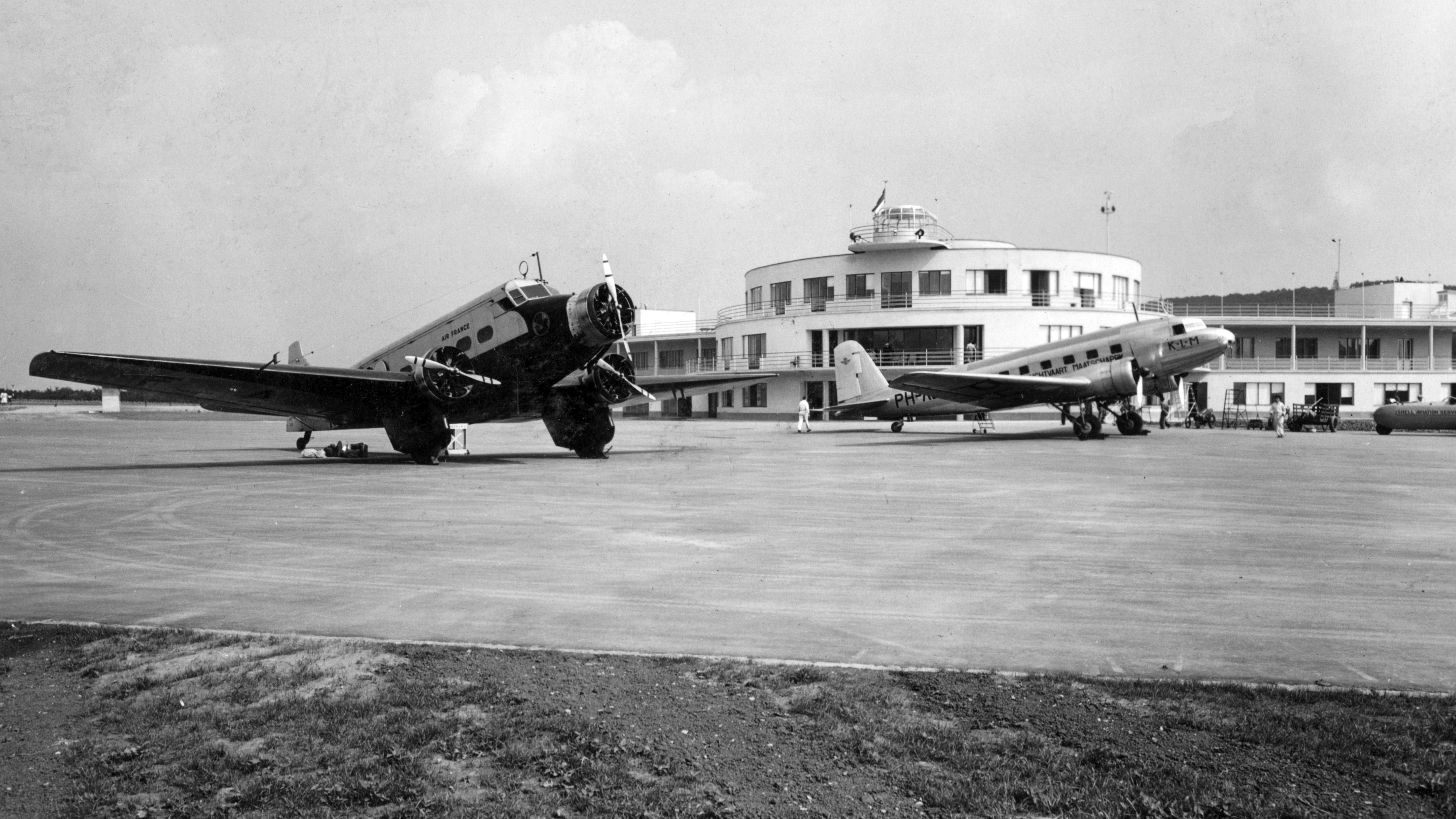 Wibault 283-T és Douglas DC-2 típusú utasszállító repülőgép. Location: Hungary, Budapest XI., Budaörs Airport Tags: Wibault-brand, airplane, airport, French brand, american brand, Douglas-brand, KLM Royal Dutch Airlines, Budapest Title: Wibault 283-T és Douglas DC-2 típusú utasszállító repülőgép.